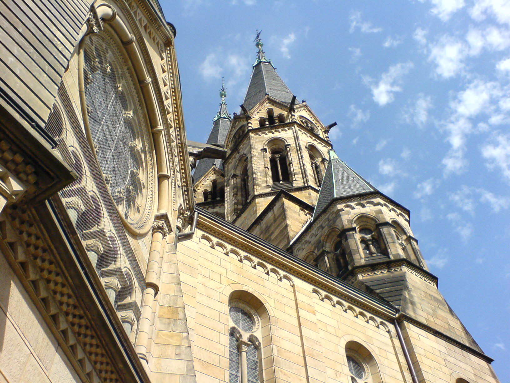 Details der Ringkirche in Wiesbaden: Zwillingsturm über Pseudolanghaus; dem Turm vorgelagert einer der vier Treppentürmchen; links die südliche Konche mit Rosettenfenstern. Selbst fotografiert von Querido am 7. September 2006